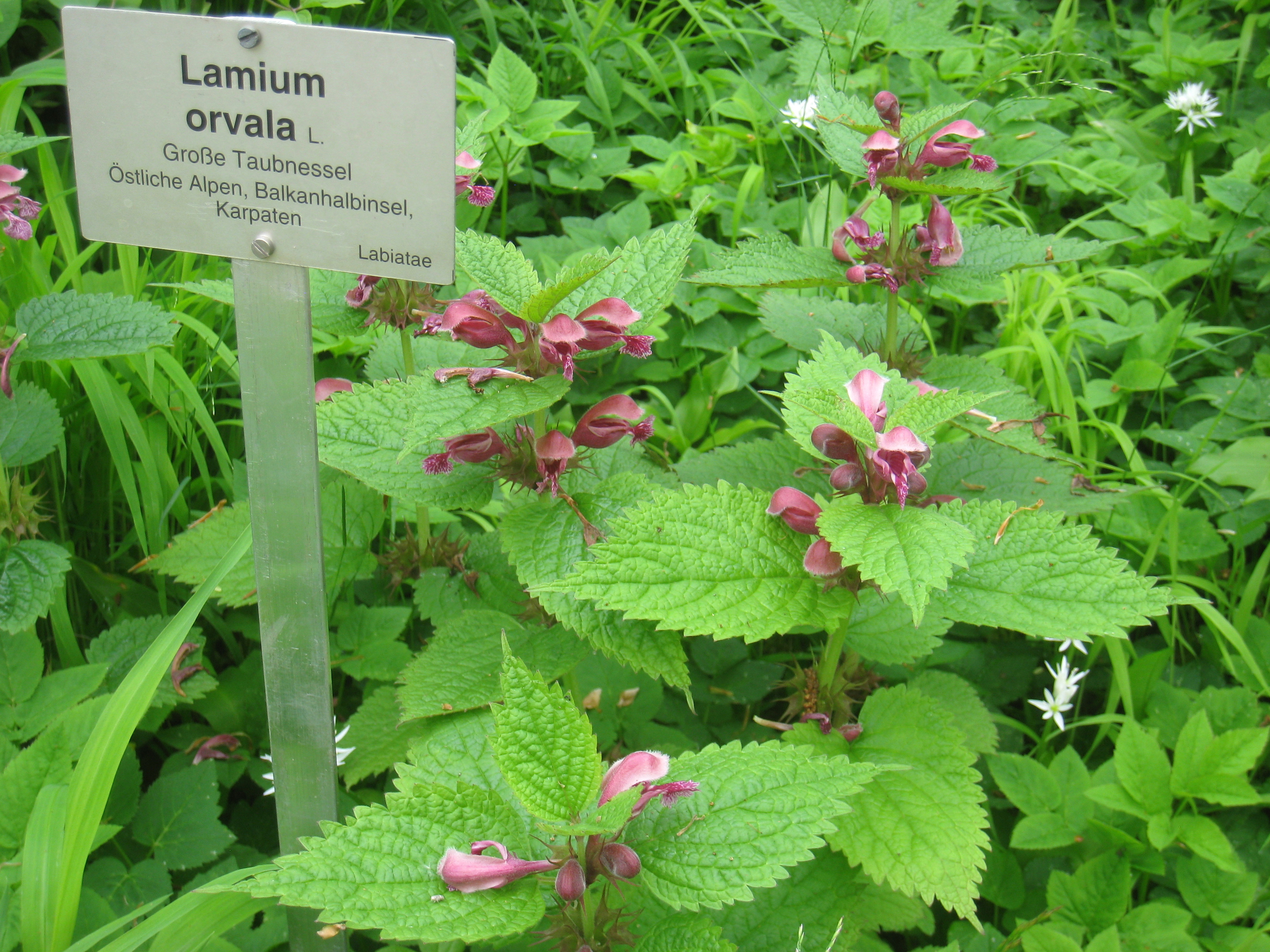 Lamium orvala specimen, in the Botanischer Garten, Berlin-Dahlem (Berlin Botanical Garden), Berlin, Germany.